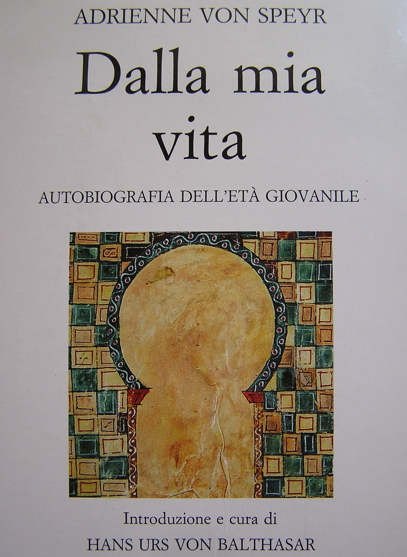 Copertina del libro: Adrienne von Speyr, Dalla mia vita. Autobiografia dell'eta giovanile, a cura di Hans Urs von Balthasar, Jaca Book, Milano 1989. ISBN 88-16-30173-2. In copertina: Particolare dell'assedio della città (PD-Art), Gerona, Archivi della Cattedrale, da La civiltà dei Monasteri, Jaca Book.